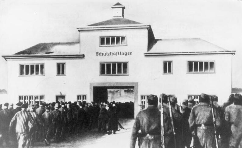 Zentralbild 9.12.1960 Zur Einweihung der Mahn- und Gedenkstätte Sachsenhausen am 23. April 1961. - Vor den Toren Berlins, auf dem Gelände des ehemaligen faschistischen Konzentrationslagers Sachsenhausen bei Oranienburg, in das von 1936 bis Kriegsende 200.000 Menschen verschleppt wurden, entsteht - wie in Buchenwald und Ravensbrück - eine würdige Mahn- und Gedenkstätte. Jeder Quadratmeter Boden ist hier vom Blut der 100.000 Toten durchtränkt, die im KZ Sachsenhausen mit seinen 73 Aussenkommandos erschlagen, erhängt, erschossen, zu Tode geprügelt, durch erbarmunslose Sklavenarbeit zu Grunde gerichtet und vergast wurden. Doch gelang es den SS-Mördern nicht, den Widerstandswillen der politischen Häftlinge zu brechen. So wurde Sachsenhausen auch zur Stätte der großen internationalen Solidarität und des mutigen Kampfes gegen Faschismus und Krieg. UBz: Von der Arbeit einrückende Häftlingskolonnen vor dem Lagertor zum Schutzhaftlager. (Diese Aufnahme wurde bei einem SS-Banditen gefunden.)